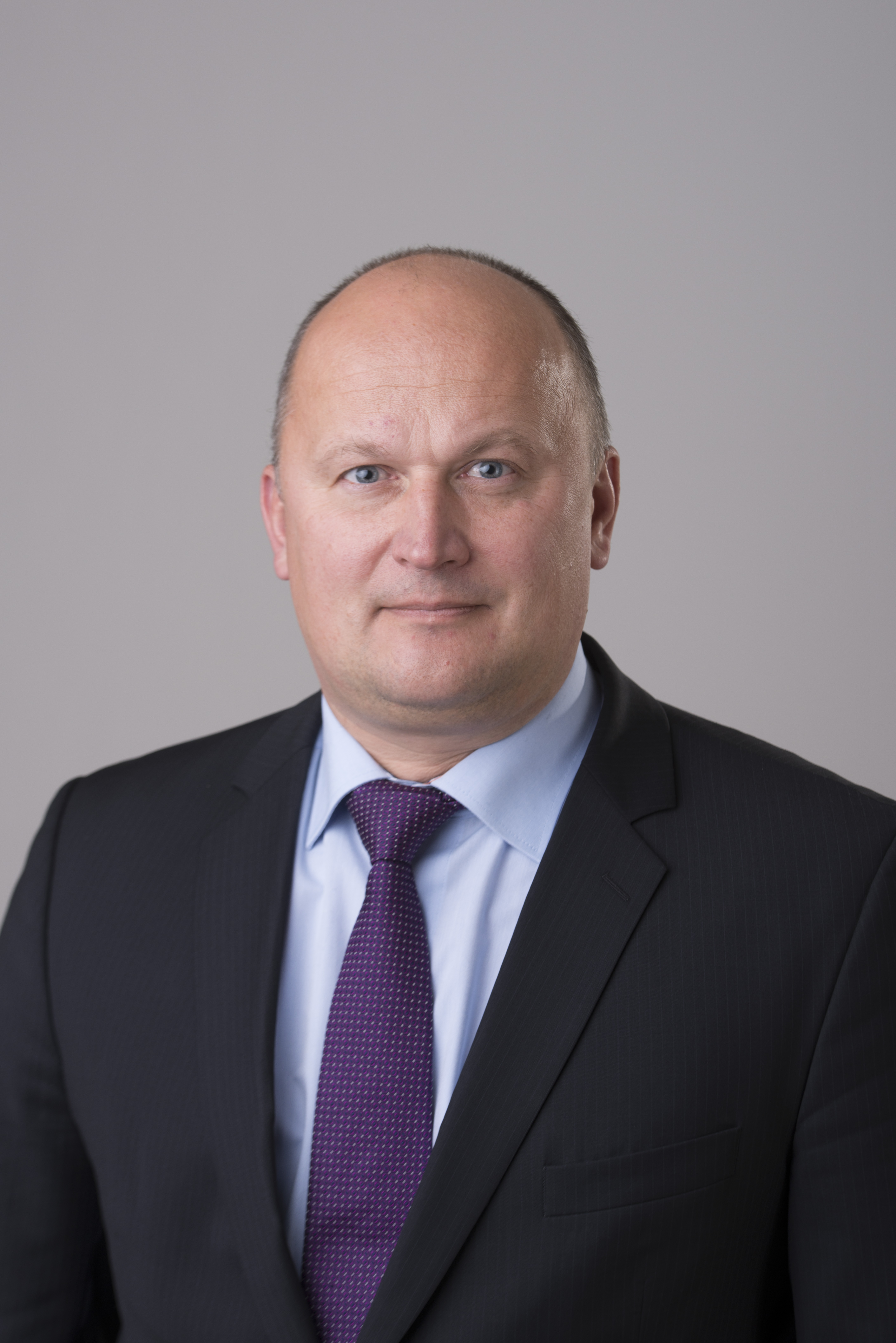 2014.gada 9.decembris. 12.Saeimas deputāts Ringolds Balodis. Foto: Reinis Inkēns, Saeimas Kanceleja Izmantošanas noteikumi: saeima.lv/lv/autortiesibas